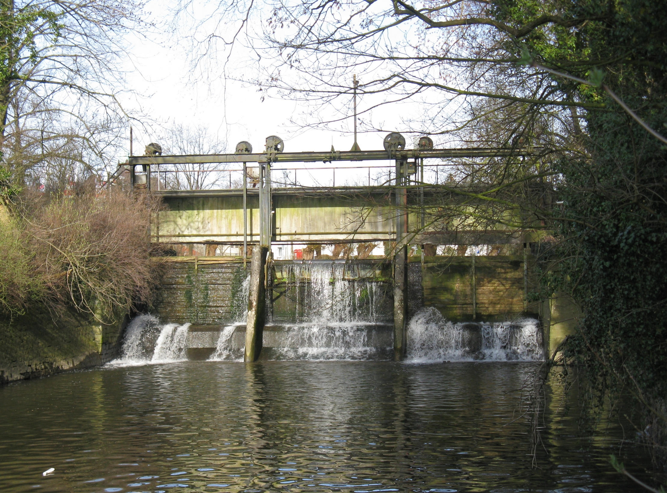 Wehr an der Werre in Lage (Lippe). Zu sehen sind zwei Hubschütze und ein Hakenschütz (Mitte), die automatisch betrieben den Wasserstand regeln.